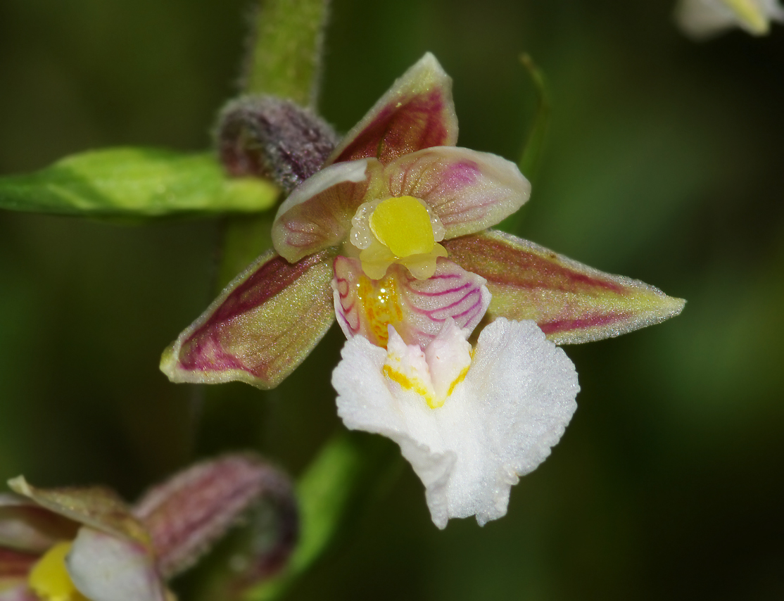 Kruszczyk błotny (Epipactis palustris) / Kuźnica Warężyńska - Dąbrowa Górnicza